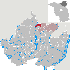 Göritz in Brandenburg (Country) - District Uckermark